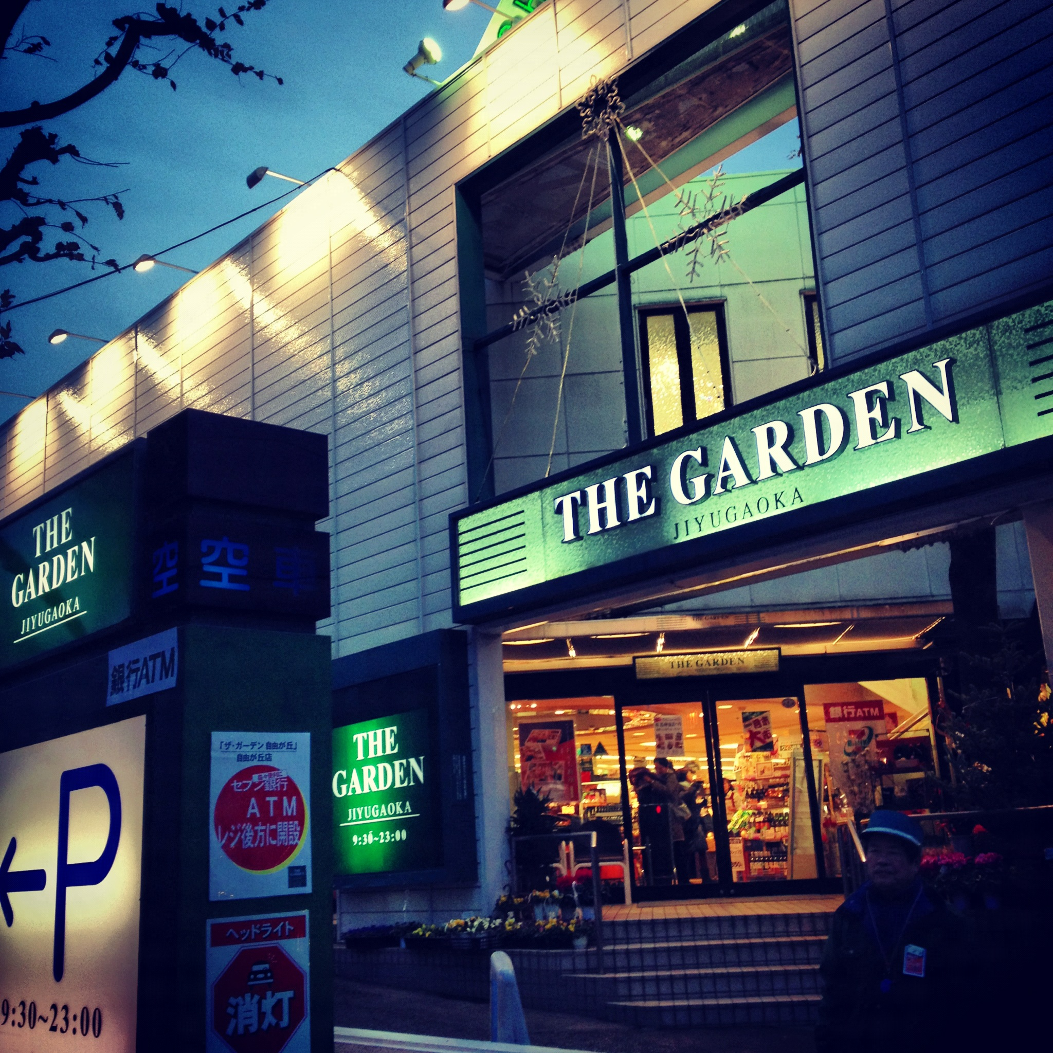 ザ・ガーデン自由が丘 本店 シェルガーデン ファサード